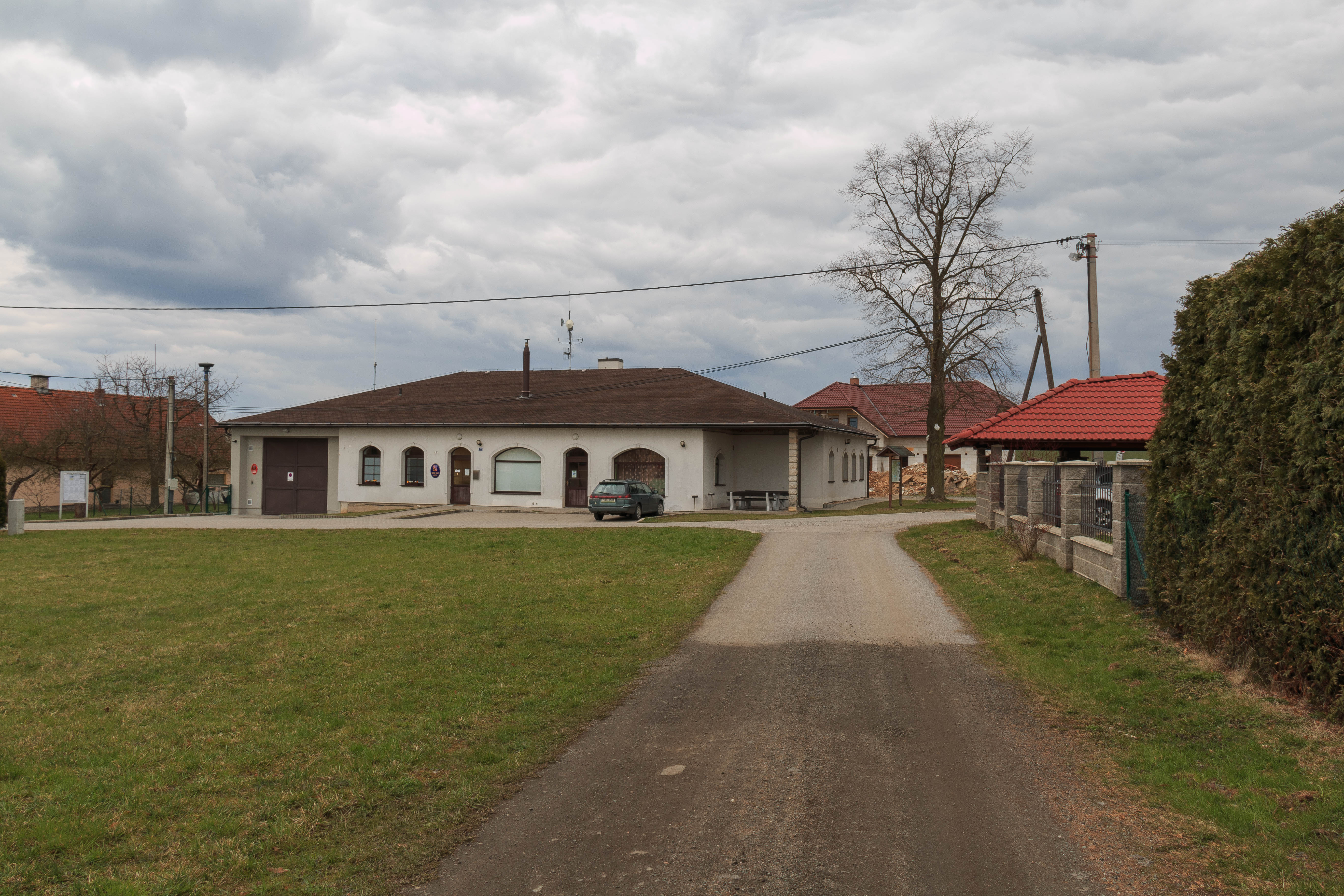 Vestec obecní úřad